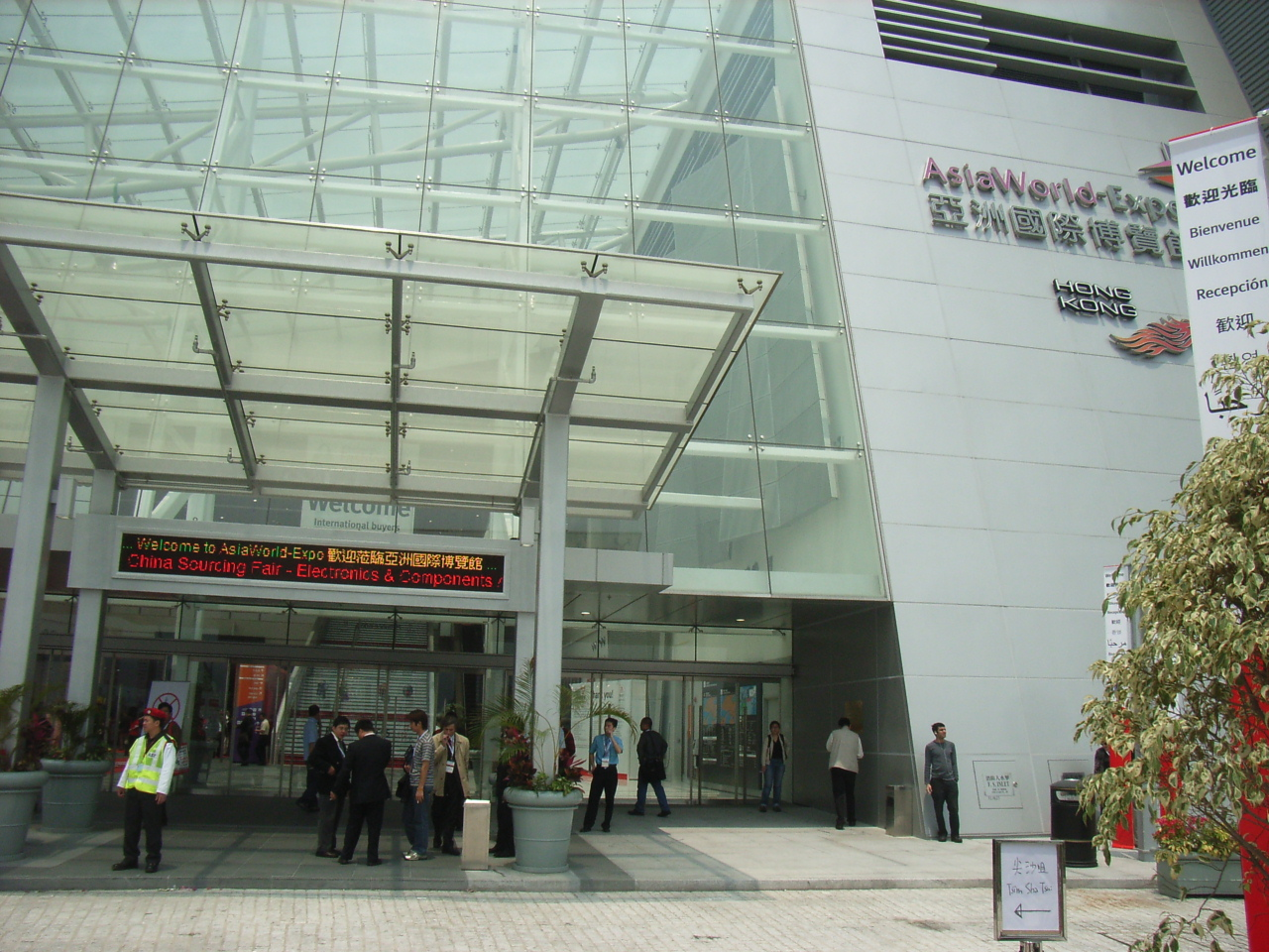 亞洲國際博覽館 AsiaWorld-Expo, Hong Kong 位於赤鱲角香港國際機場的北面，於2005年12月21日由行政長官曾蔭權主持開幕儀式。